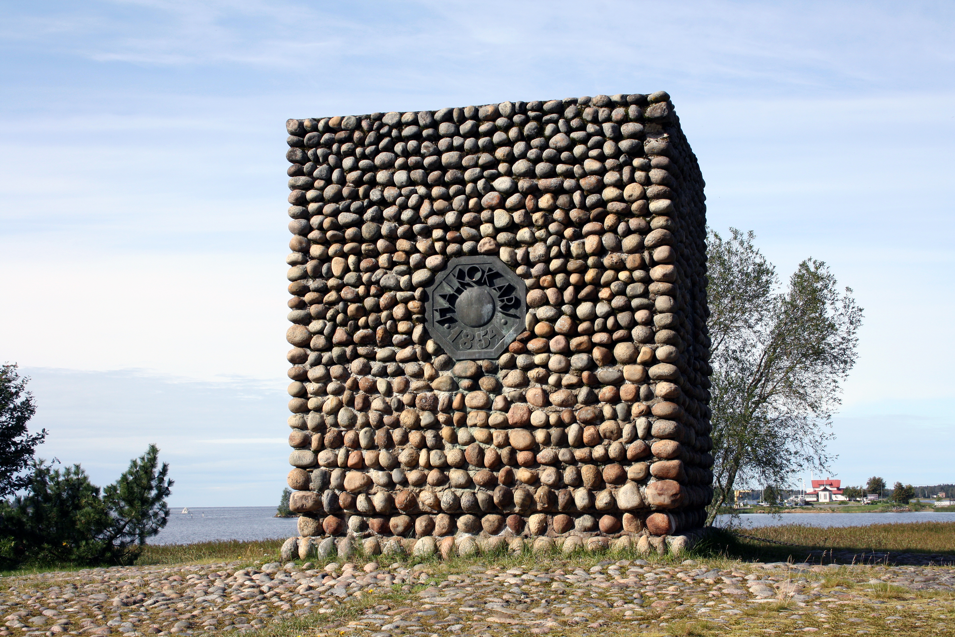 Oolannin sotaan liittyneen Halkokarin kahakan muistomerkki Halkokarilla Kokkolassa.